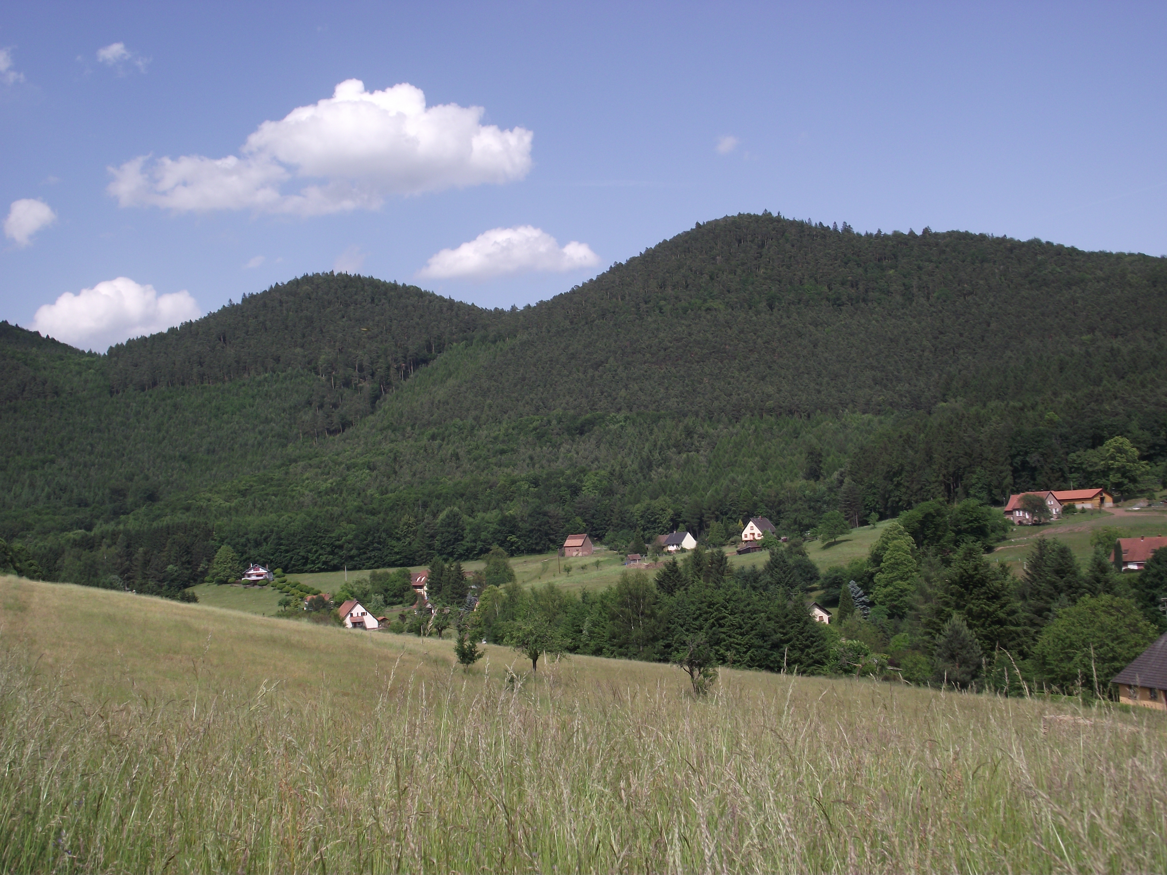 Aspect des Vosges du Nord à Windstein. Sommets du Mittelkopf (515 m) à gauche et du Steinkopf (515 m) à droite